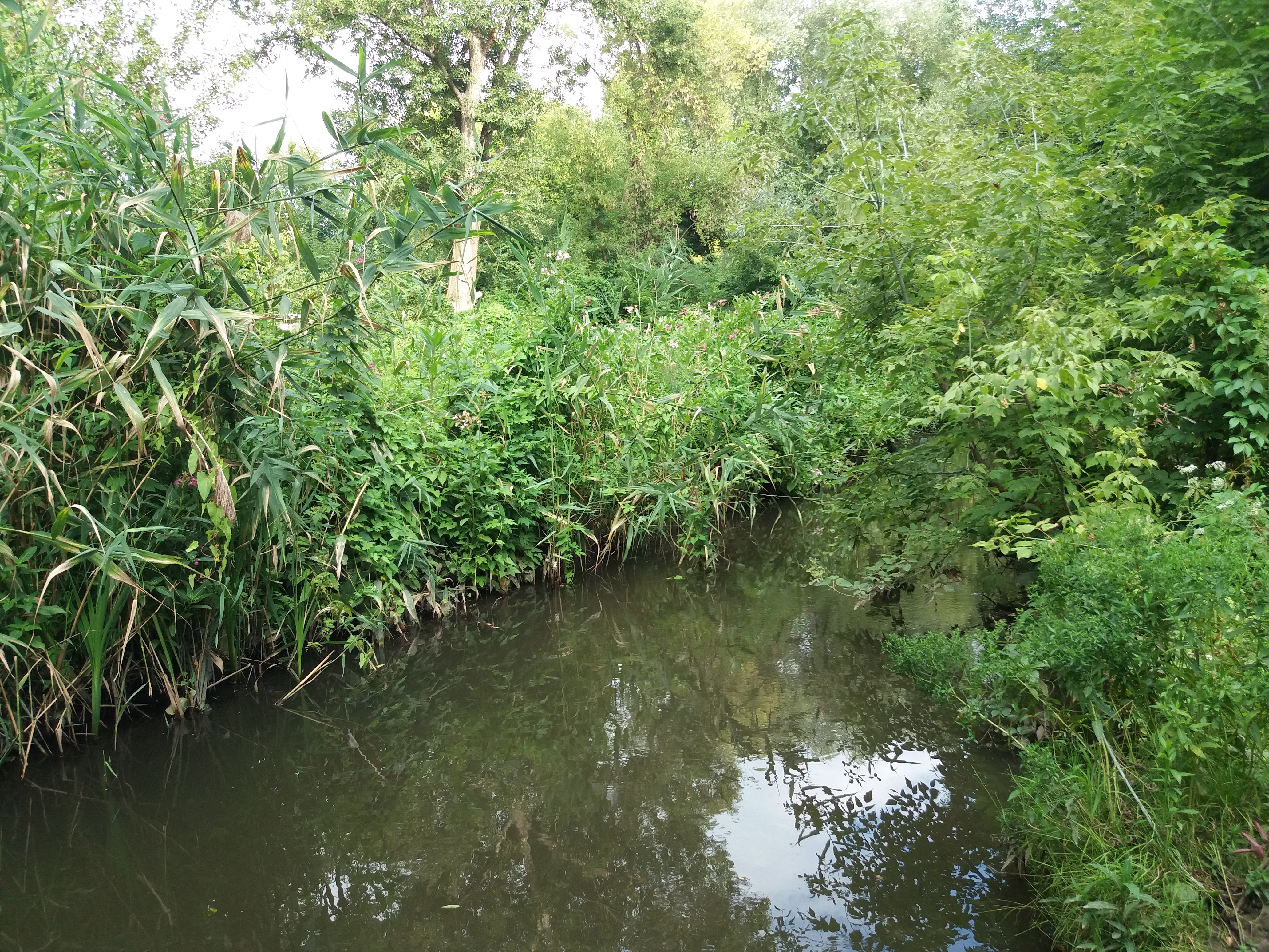 Немишля в районі Старої Салтівки